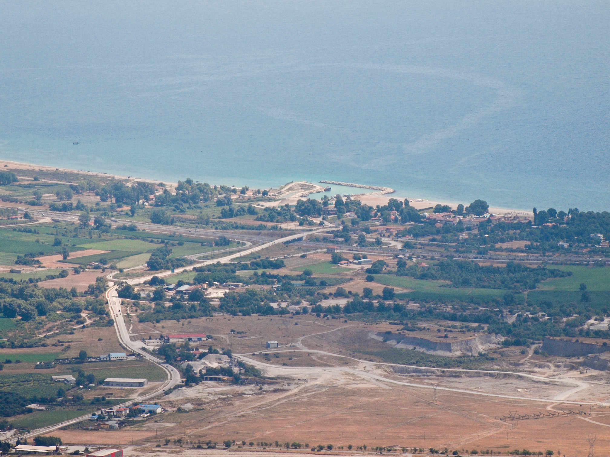 Λιμενασ Λιτοχωρου. Вид с Олимпа